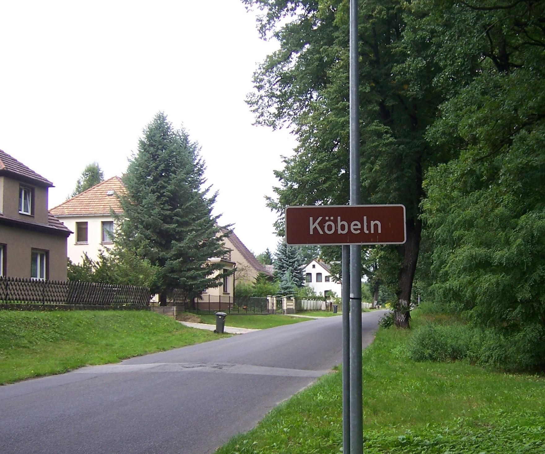 Ortseingang von Köbeln aus Richtung Bad Muskau.